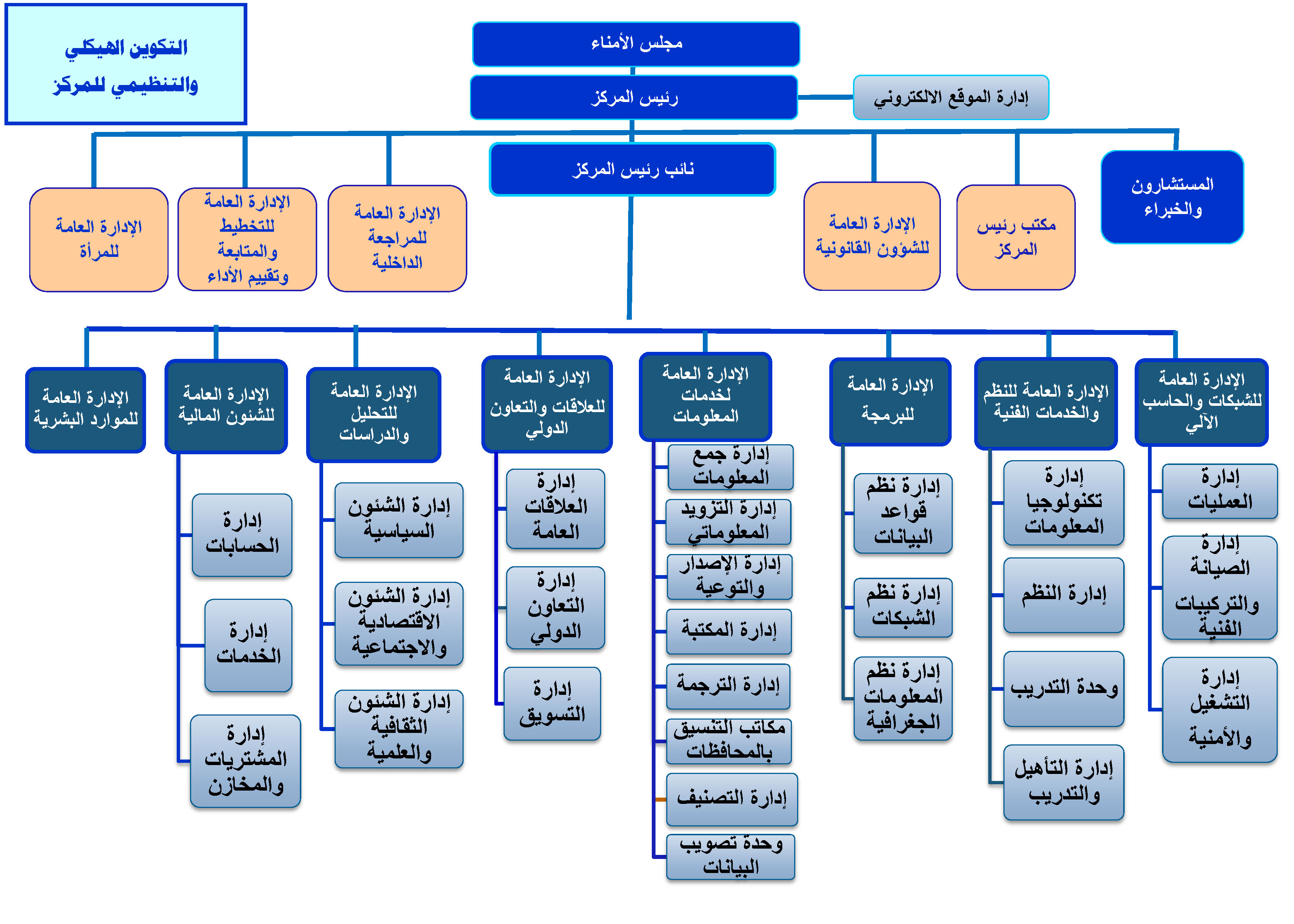 الهيكل التنظيمي للمركز الوطني للمعلومات - 2018